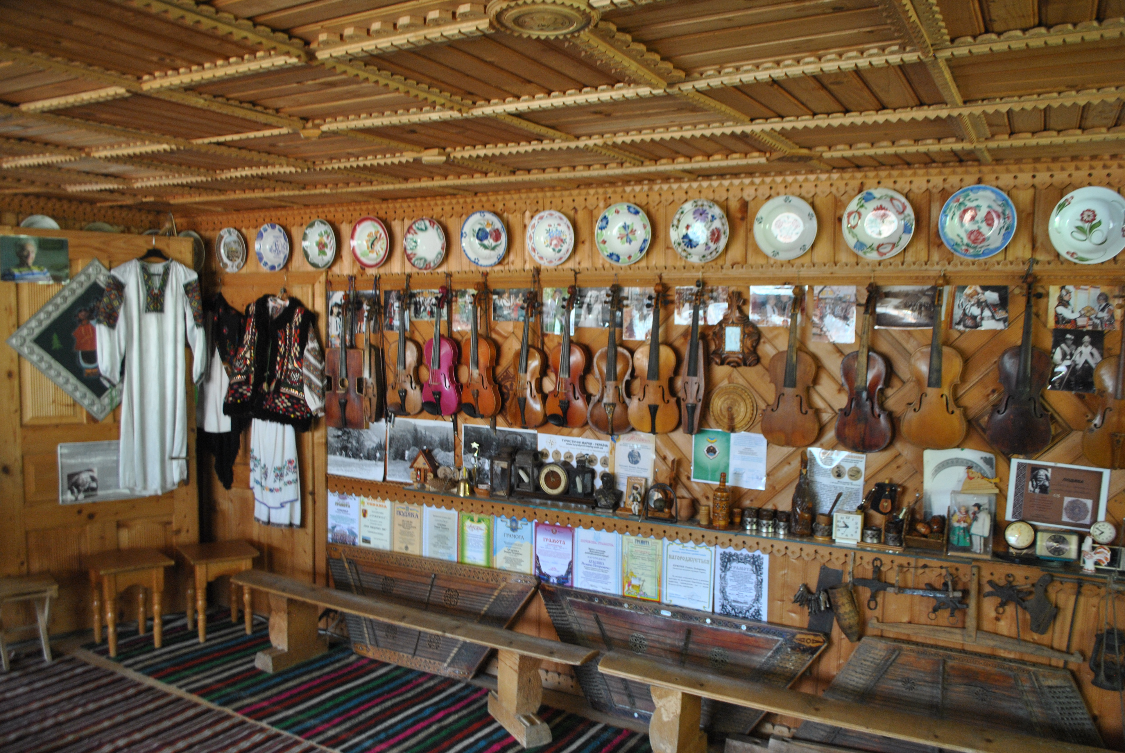 Інструменти в музеї Кумлика